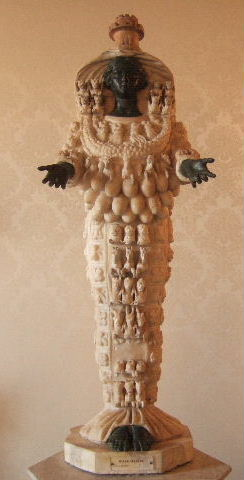 Kapitolinisches Museum Rom: Statue der Artemis von Ephesus - römische Kopie eines Originals aus dem 2. Jahrhundert n. Chr., Marmor und Bronze, 115 cm